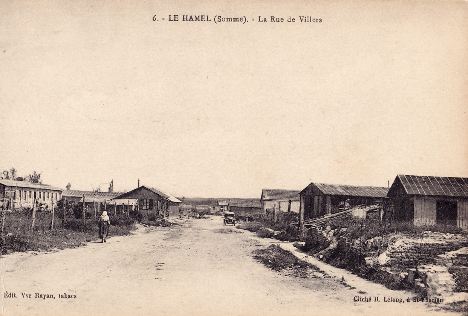 Carte postale ancienne éditée par Veuve Rayan, tabacs : LE HAMEL (Somme) - La rue de Villers